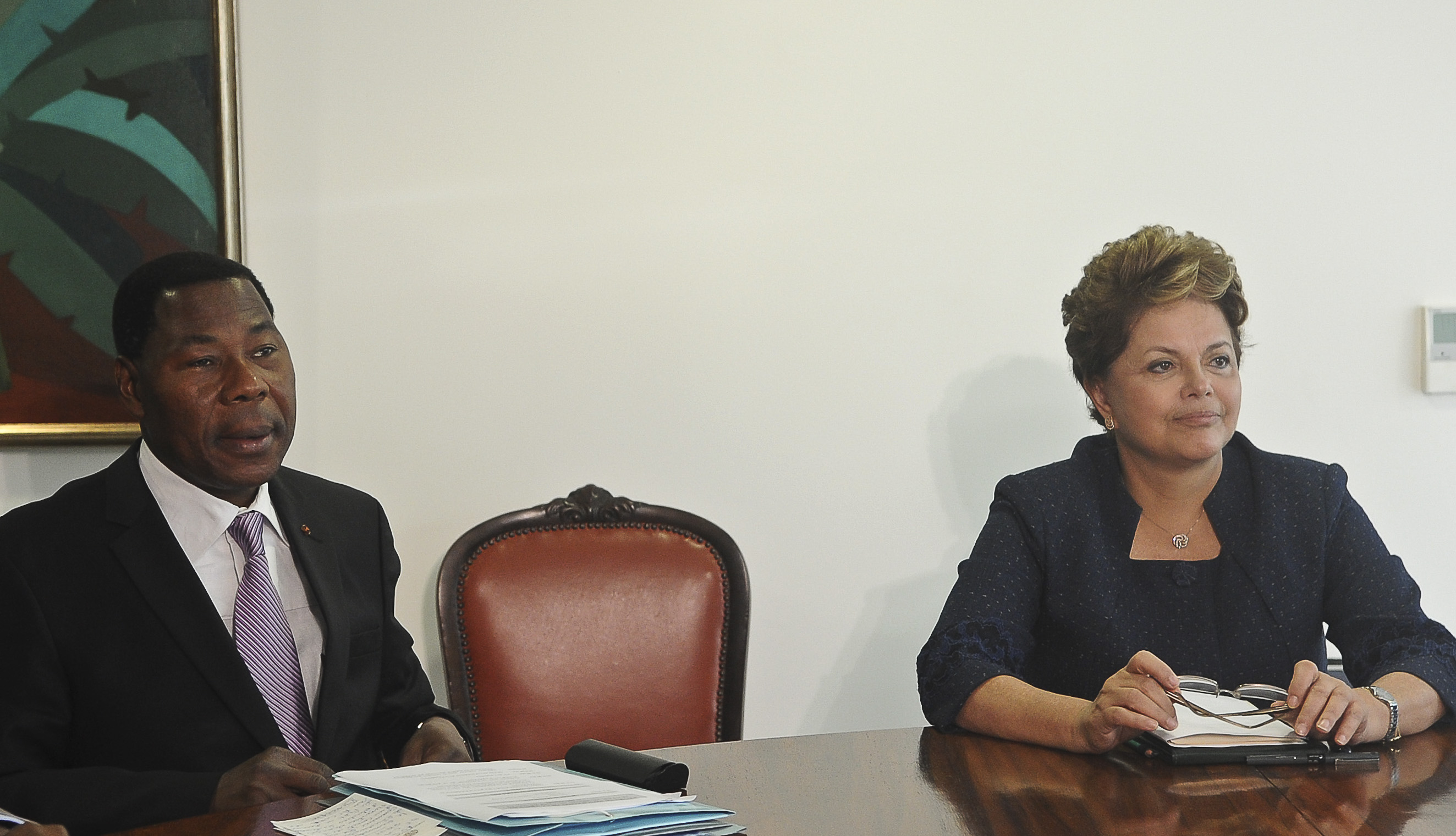 Brasília - A presidenta Dilma Rousseff recebe o presidente da República do Benin, Boni Yayi, no Palácio do Planalto